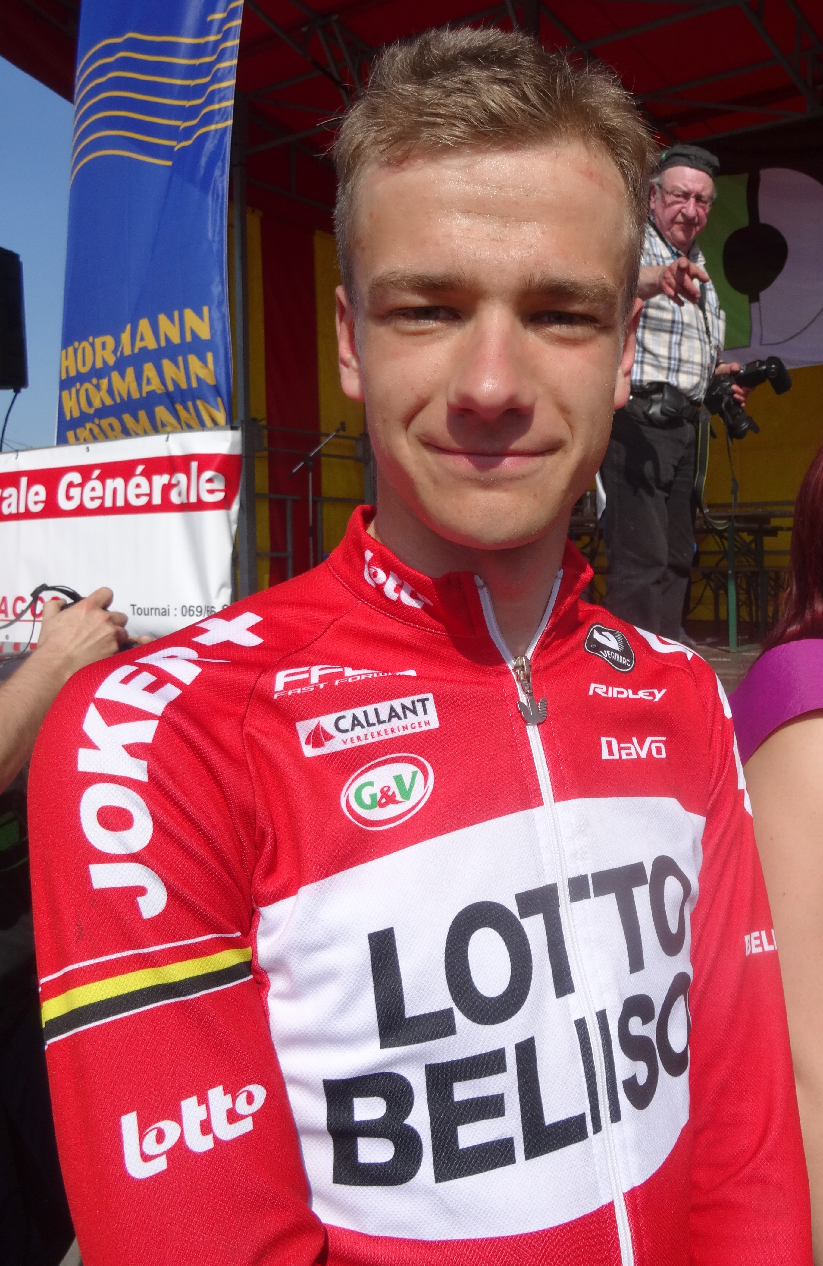 Grand Prix Criquielion 2014, Deux-Acren. Depicted person: Kevin Deltombe Depicted team: Lotto-Belisol U23